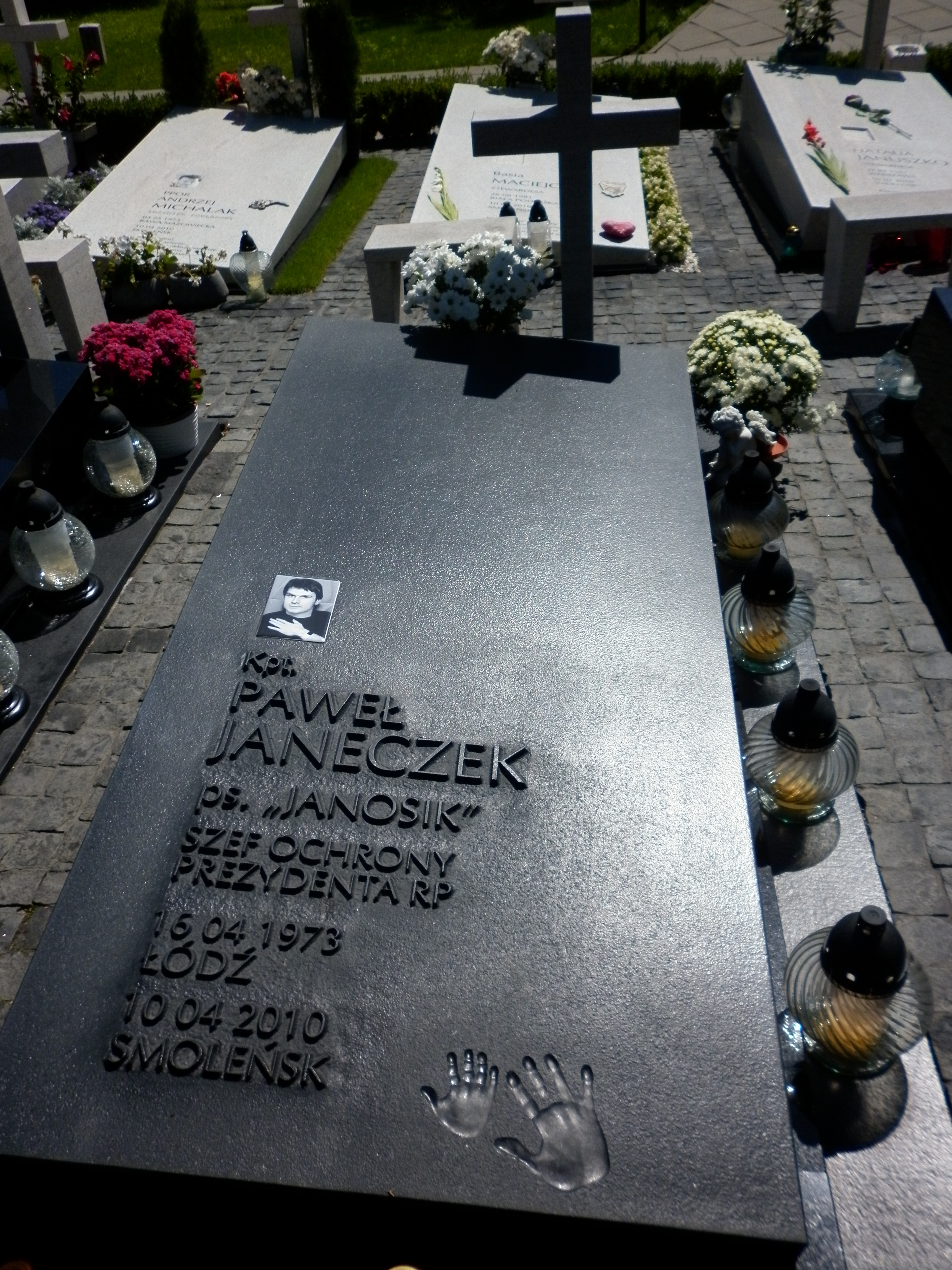 Grób Pawła Janeczka na Cmentarzu Wojskowym na Powązkach